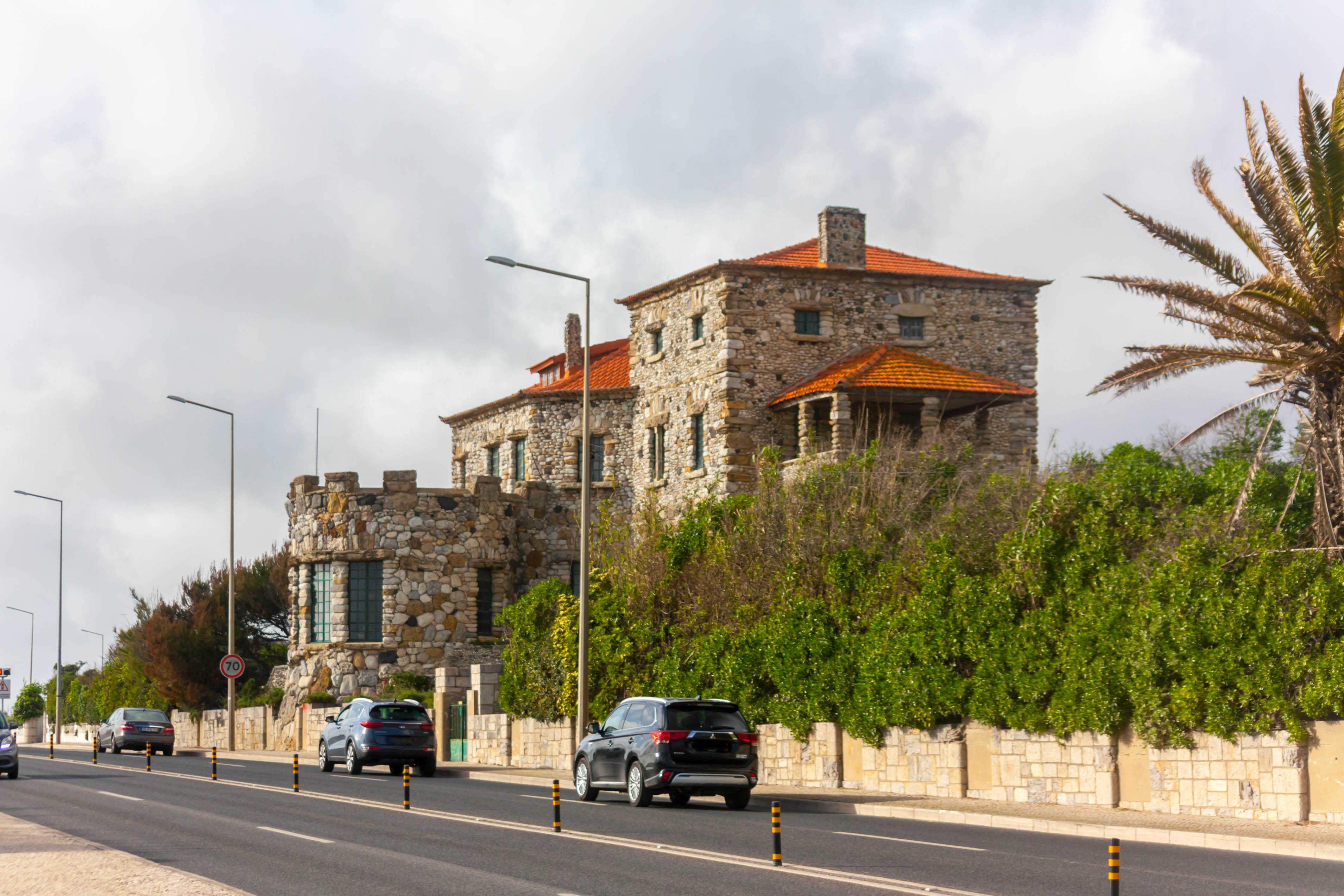 Casa das Pedras, Avencas, Parede.